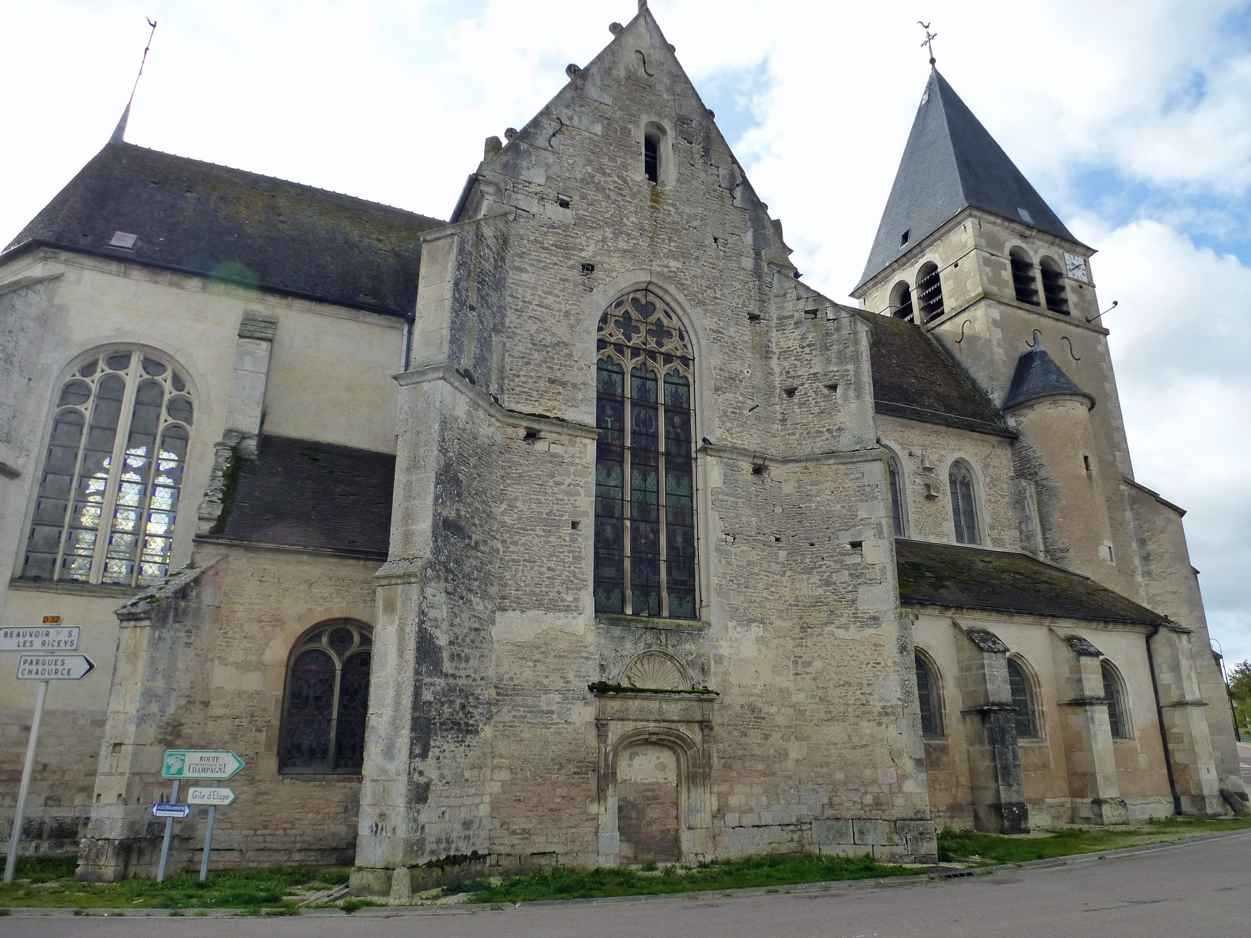 Eglise du 14/15 ème siècle